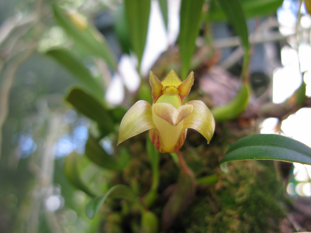 Epigeneium chapaense flwr